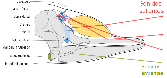 Versión en idioma español